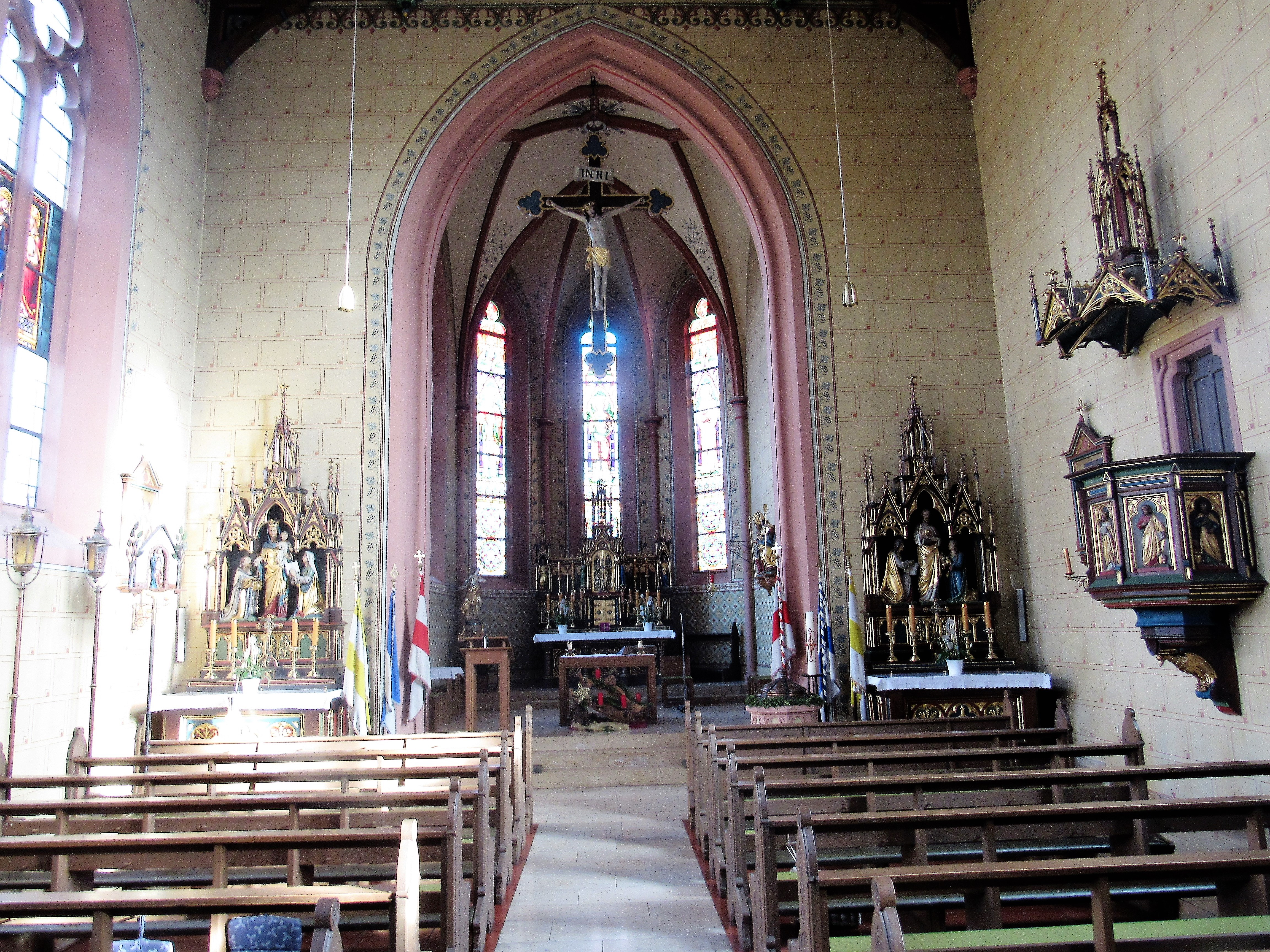 Innenraum der Kirche